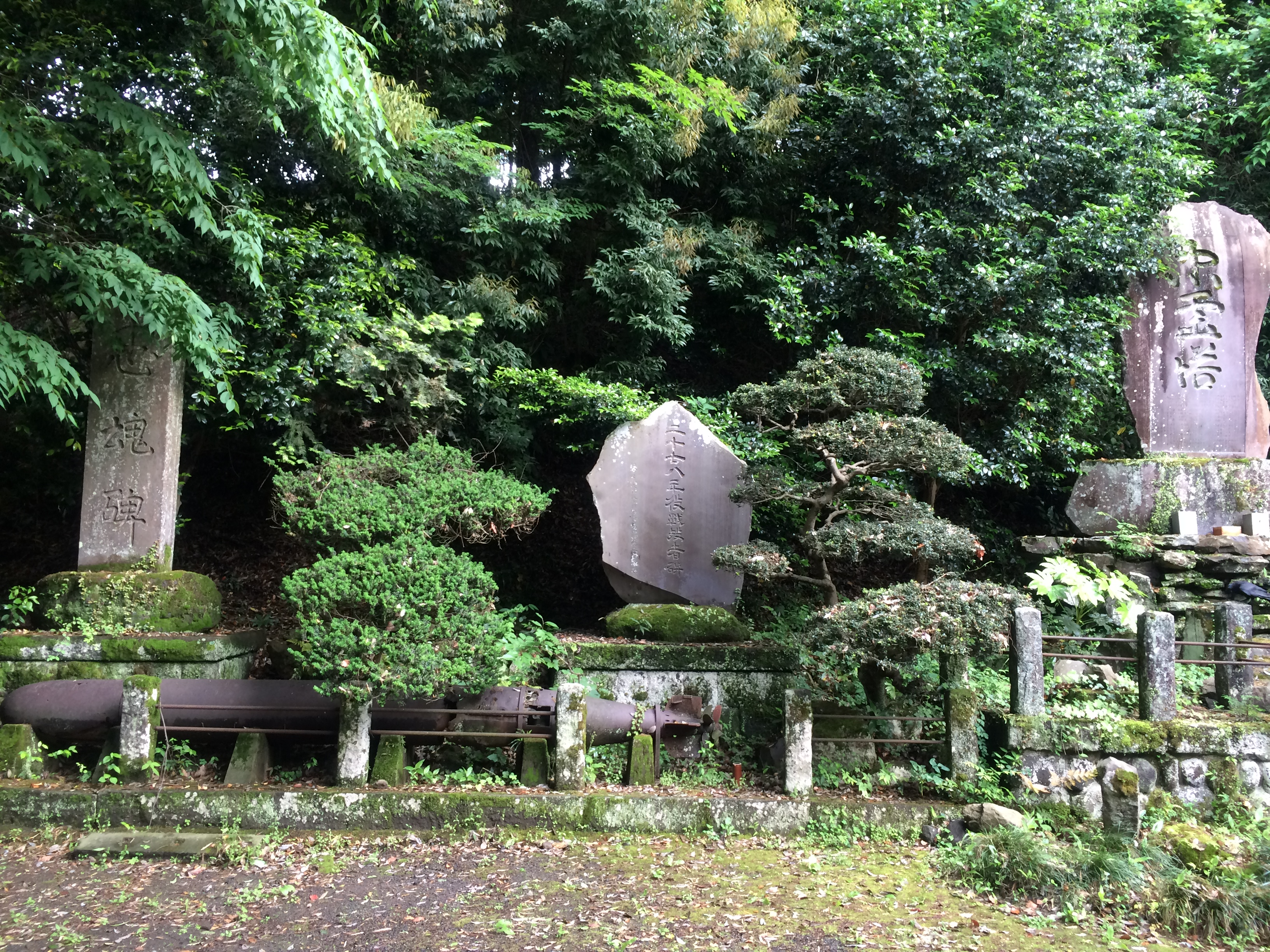 朽ち果てた魚雷は93式酸素魚雷と思われる。